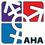 Das aktuelle Logo der Allgemeinen Homosexuellen Arbeitsgemeinschaft (AHA-Berlin e.V.). Es wurde im März 2007 von der Mitgliederversammlung der AHA als neues Logo angenommen und greift nun auch das Thema Transgender mit auf.